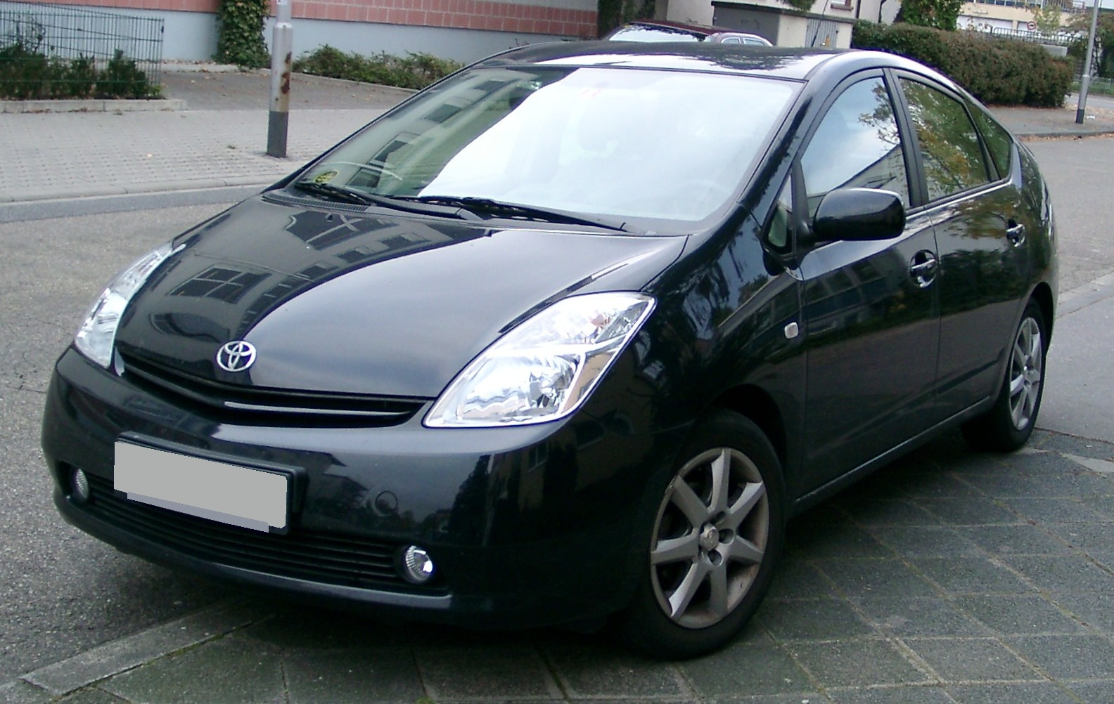 Toyota Prius